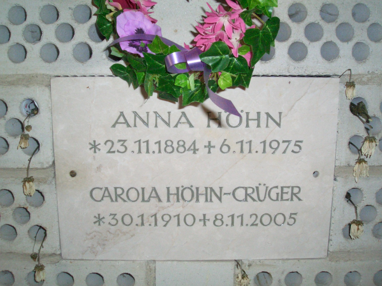 Urnenrab der Schauspielerin Carola Höhn auf dem Waldfriedhof Grünwald